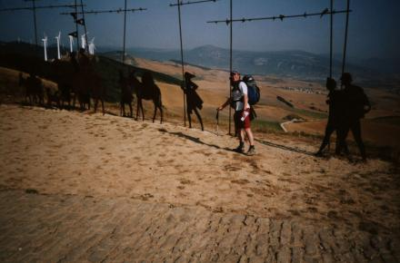 Onderweg naar Santiago het pelgrims monumnet op een berg vlak bij Puente la Reina